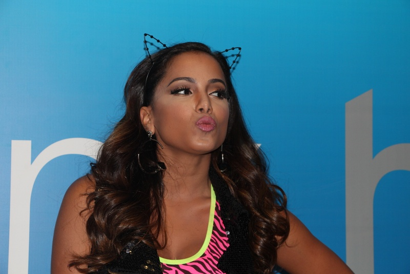 6 - Anitta (6)